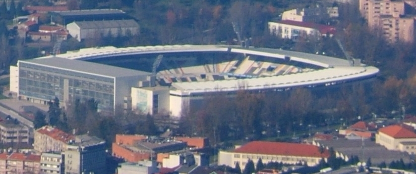 Estádio do Vitória visto da Penha.